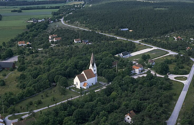 Motiv: Stenkumla kyrka Nyckelord: Flygbilder, Riksintressen Kategori: KyrkbyStenkumla kyrka